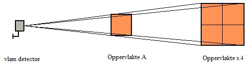 Vierkantswet Dutch, Jan Nijkamp, Sense-WARE Fire and Gas Detection BV